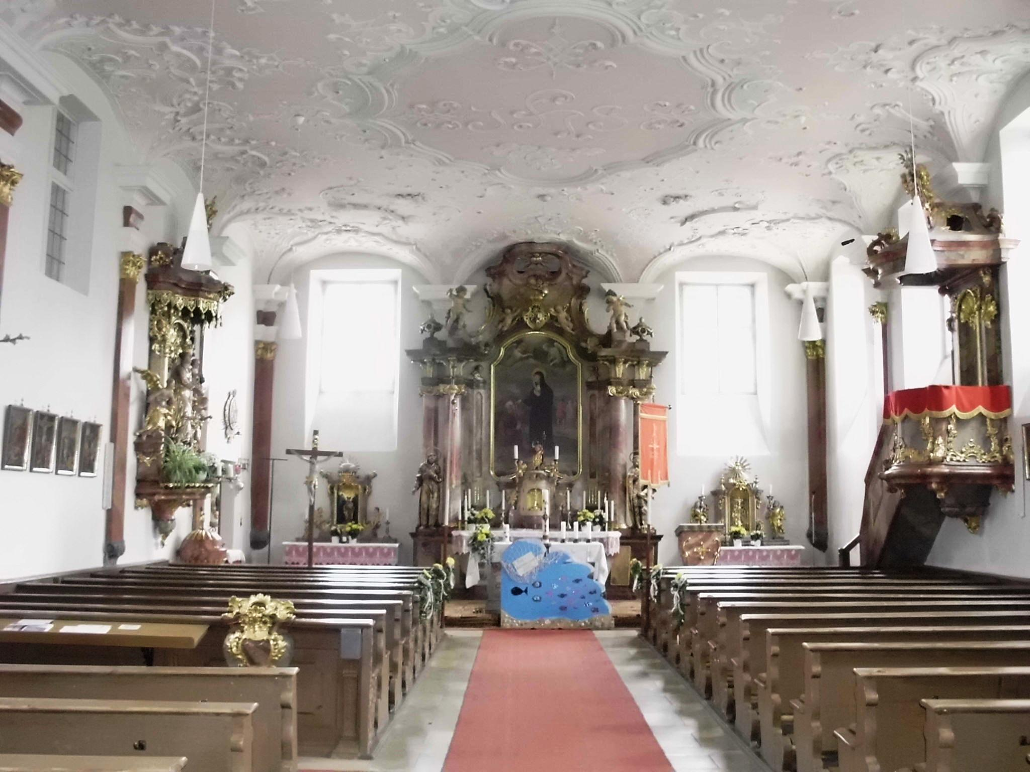 Absberg, Landkreis Weißenburg-Gunzenhausen (Bayern), Ehemaliges Deutschordensschloss, Inneres der Schlosskapelle (heute Kath. Pfarrkirche St. Ottilia) gegen Osten